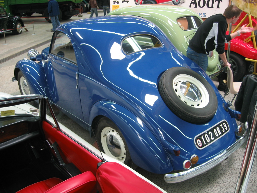 Simca 8